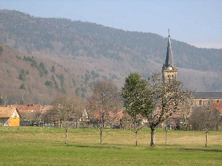 village de Lepuix-Gy (Territoire de Belfort, France). En arrière-plan : le massif des Vosges. Photo prise le 30 mars 2004 par LP90 Licence GFDL LP90